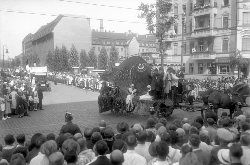 Der grosse historische Fischzug in Berlin - Stralau ! Alljährlich findet in Stralau ein historischer Fischzug statt, zur Erinnerung an die jahrhundert alte Ueberlieferung der Fischzüge der Stralauer auf dem Rummelburger See. Blick auf den Festzug in den Strassen Stralaus.